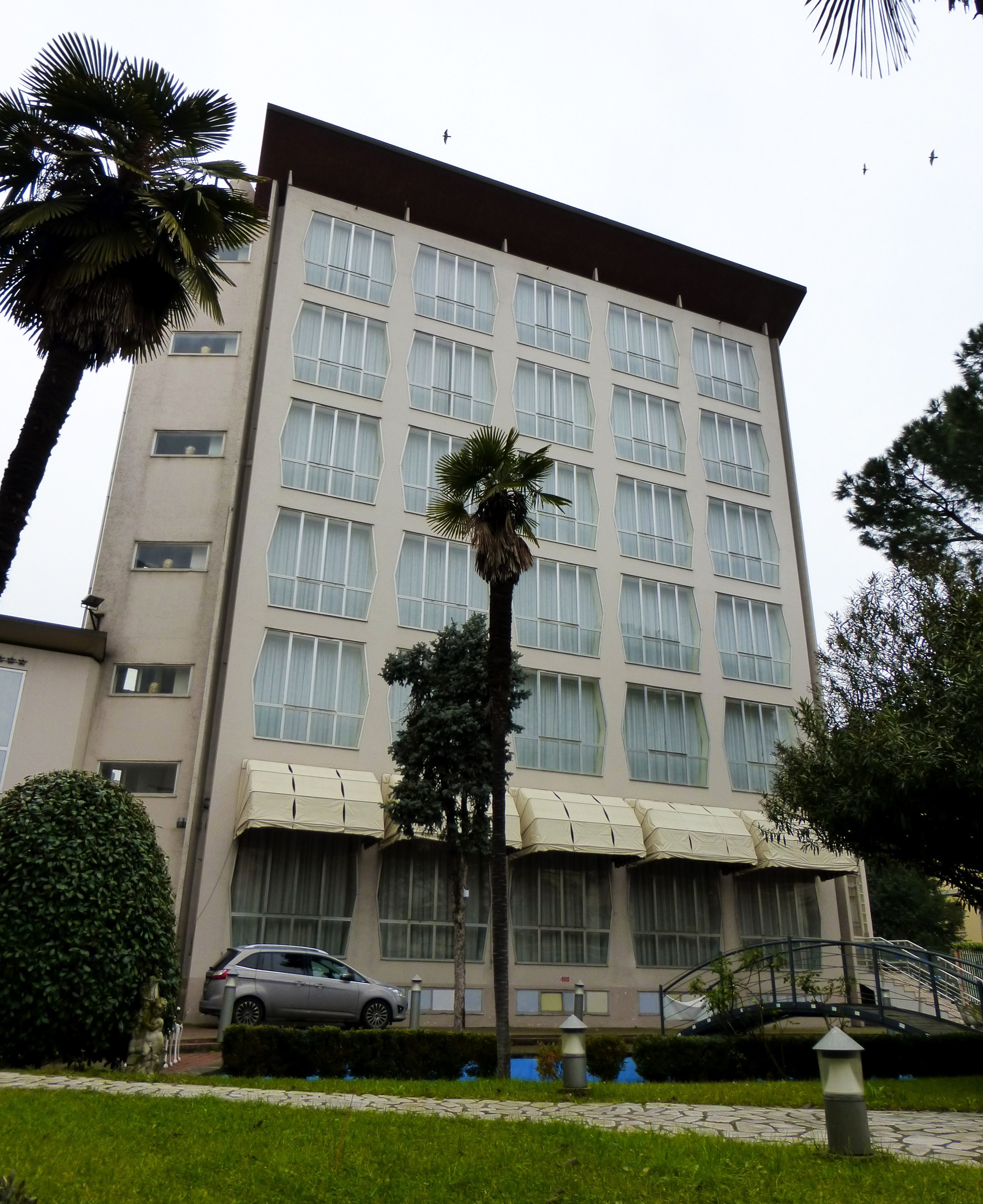 Facciata dell'Hotel della Città et de la Ville a Forlì